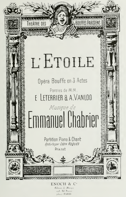 L'étoile, cover page